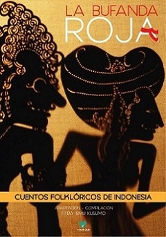 la bufanda roja, cuentos folkloricos Indonesia, fue lanzado en la Feria Internacional del libro Infantil y Juvenil FILIJ 2017